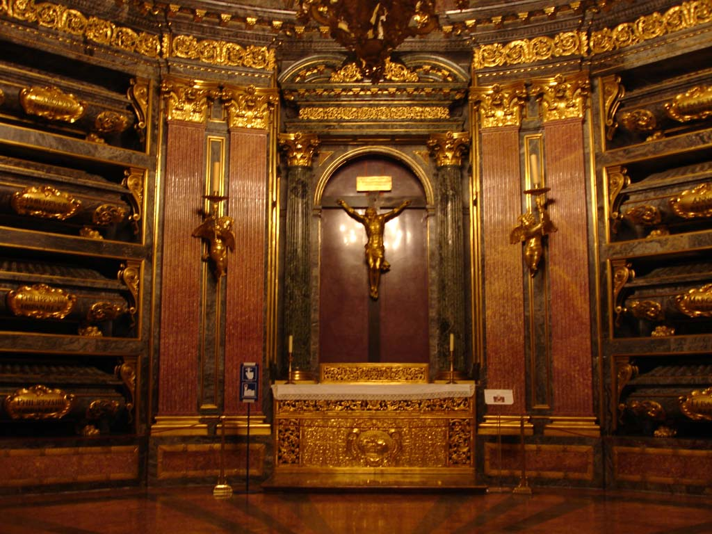 Vista general del altar y del Panteón de Reyes del monasterio de San Lorenzo de El Escorial, (España).